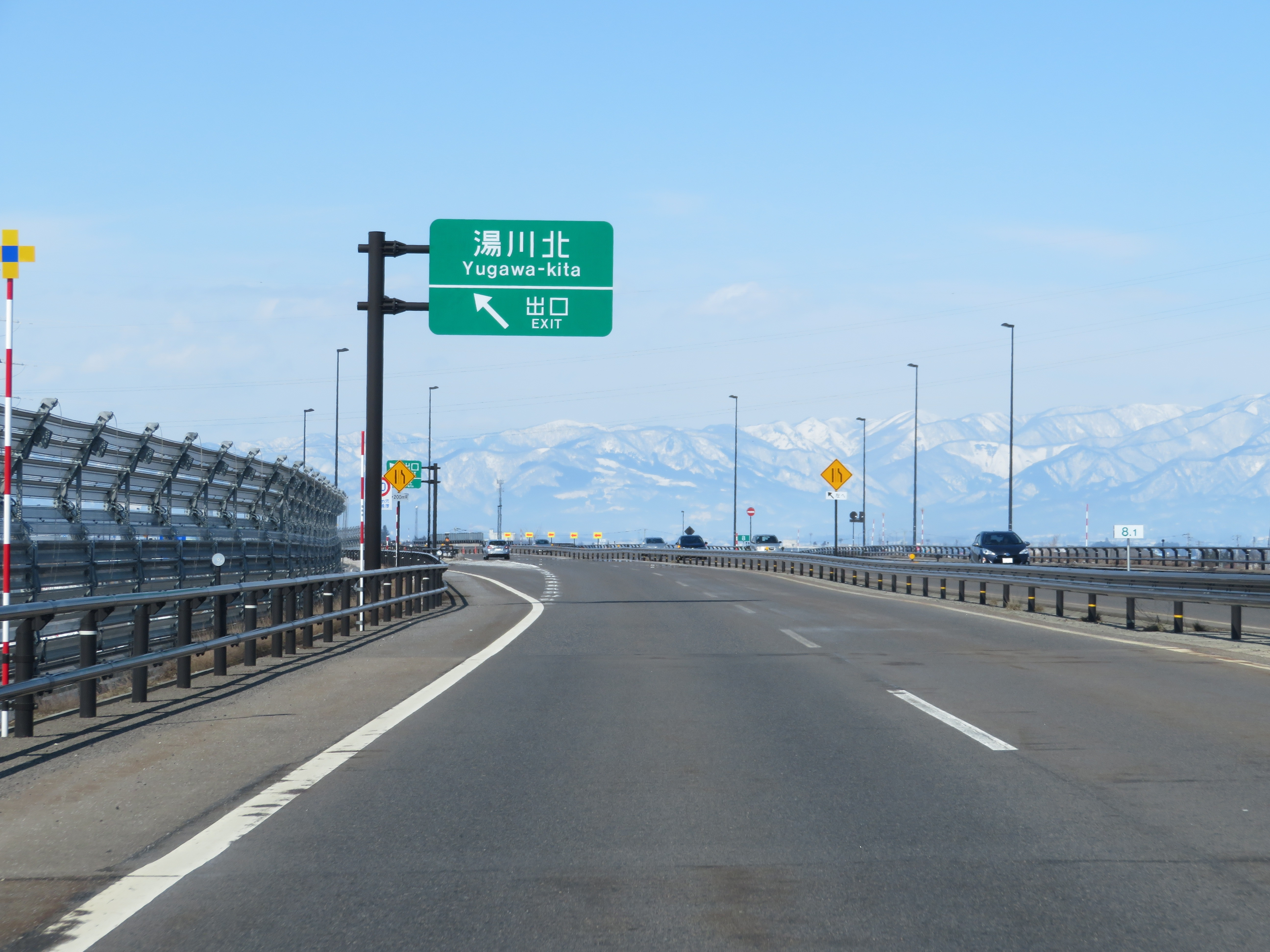 国道121号会津縦貫北道路 湯川北インターチェンジ 出口付近（会津若松方面側から撮影）